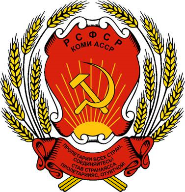 Герб Коми АССР (1937-1978)